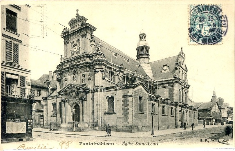 L'église Saint-Louis de Fontainebleau au début du XXème siècle